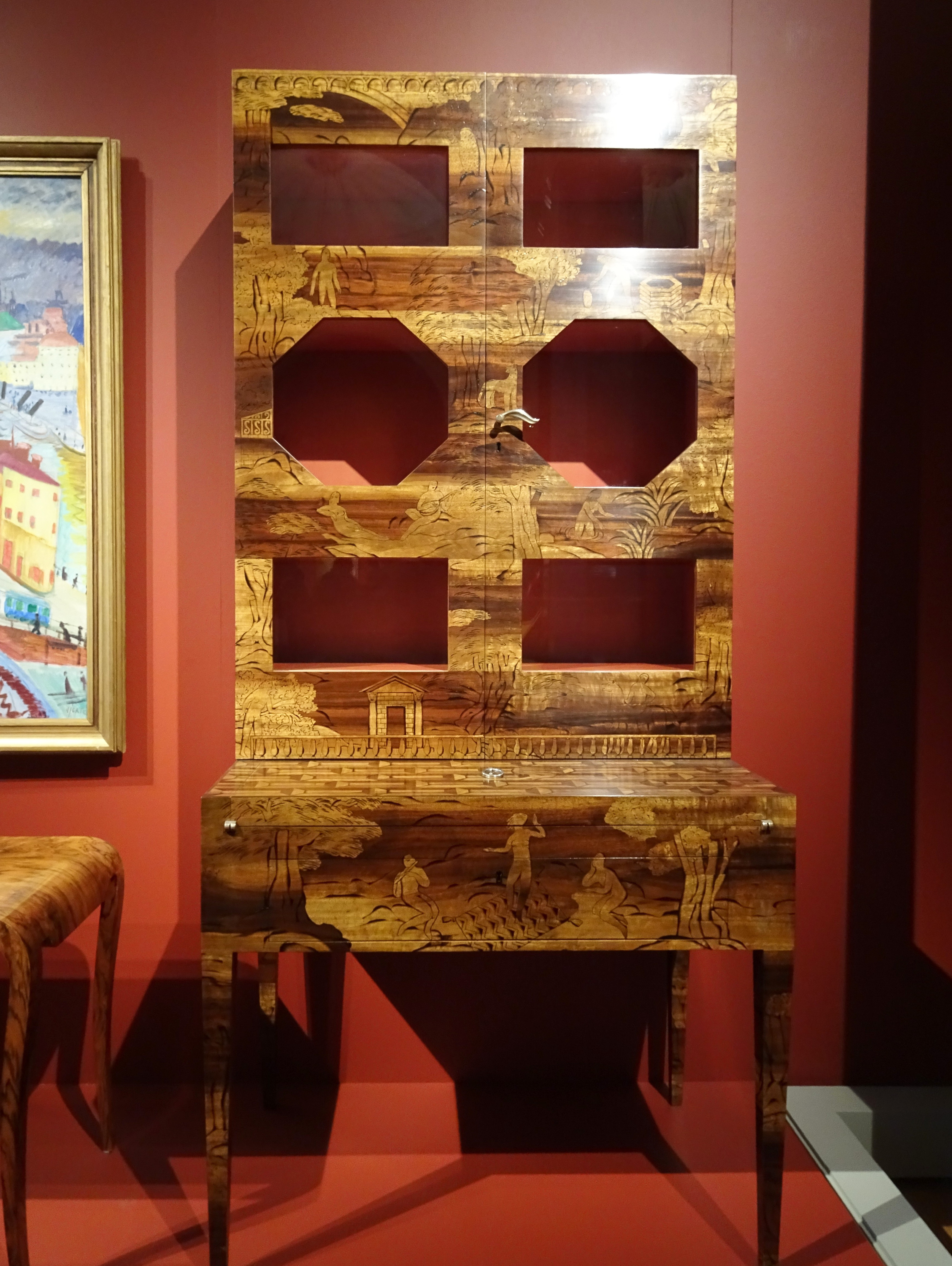 Skåp "Paradiset", formgivning Uno Åhrén, 1924